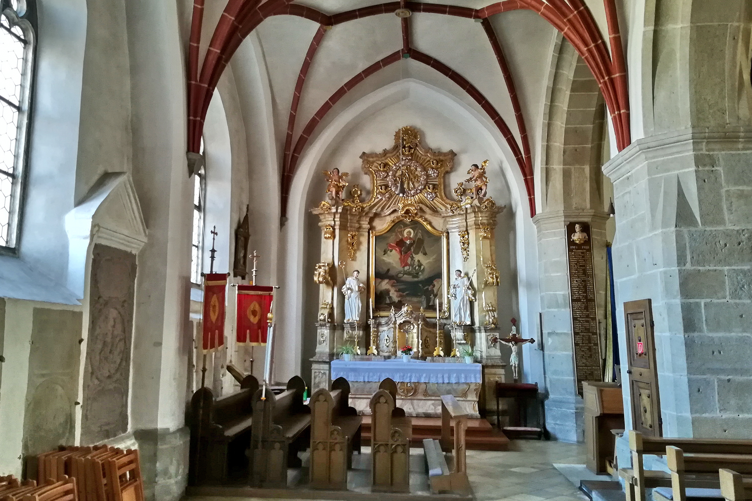 Die katholische Pfarrkirche Mariä Himmelfahrt ist ein denkmalgeschütztes Kirchengebäude in Chammünster.